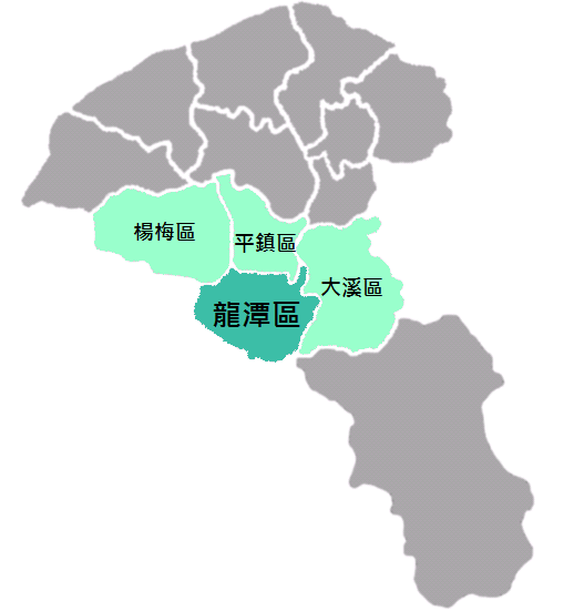 龍潭區位置圖